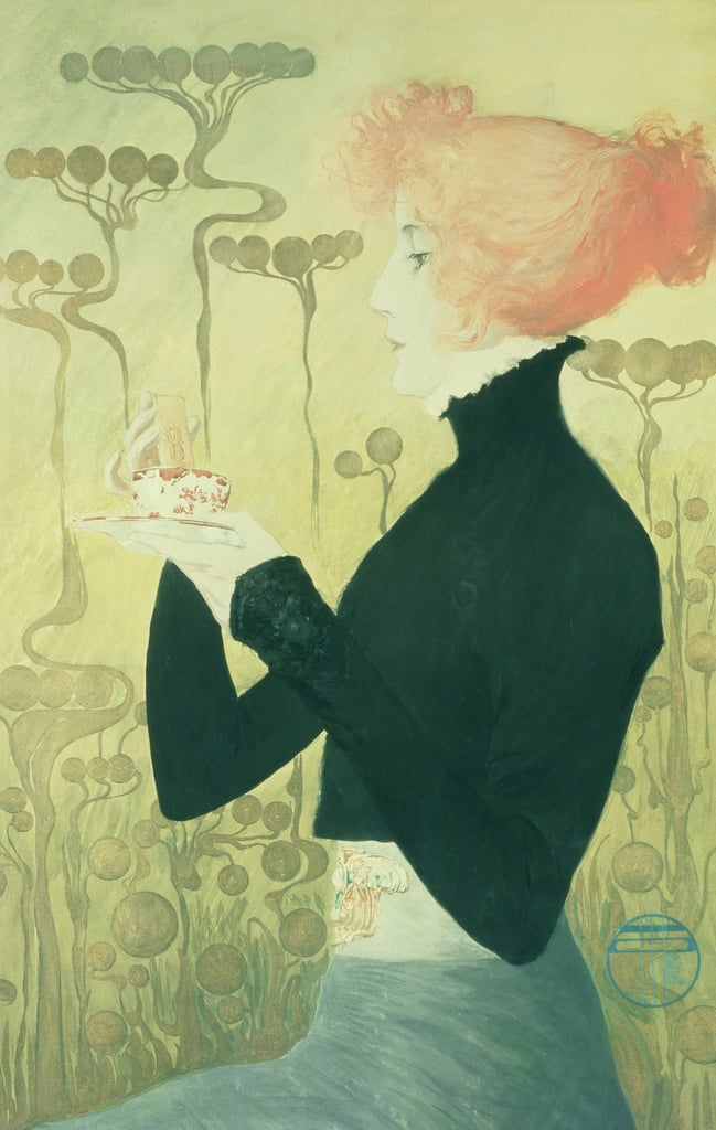 poster